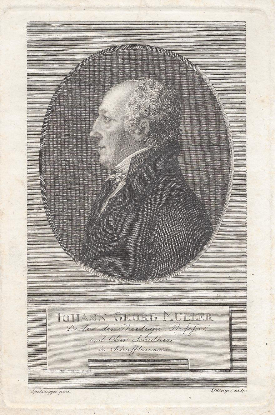 Johann Georg Müller, Doktor der Theologie, Professor und Ober Schulherr in Schaffhausen, Stahlstich von Johann Martin Esslinger (1793-1841) nach einer Vorlage von Alexander Speissegger (1750-1798), in einem Brief Müllers an den Maler als schlechtes Bild (sic!) bezeichnet